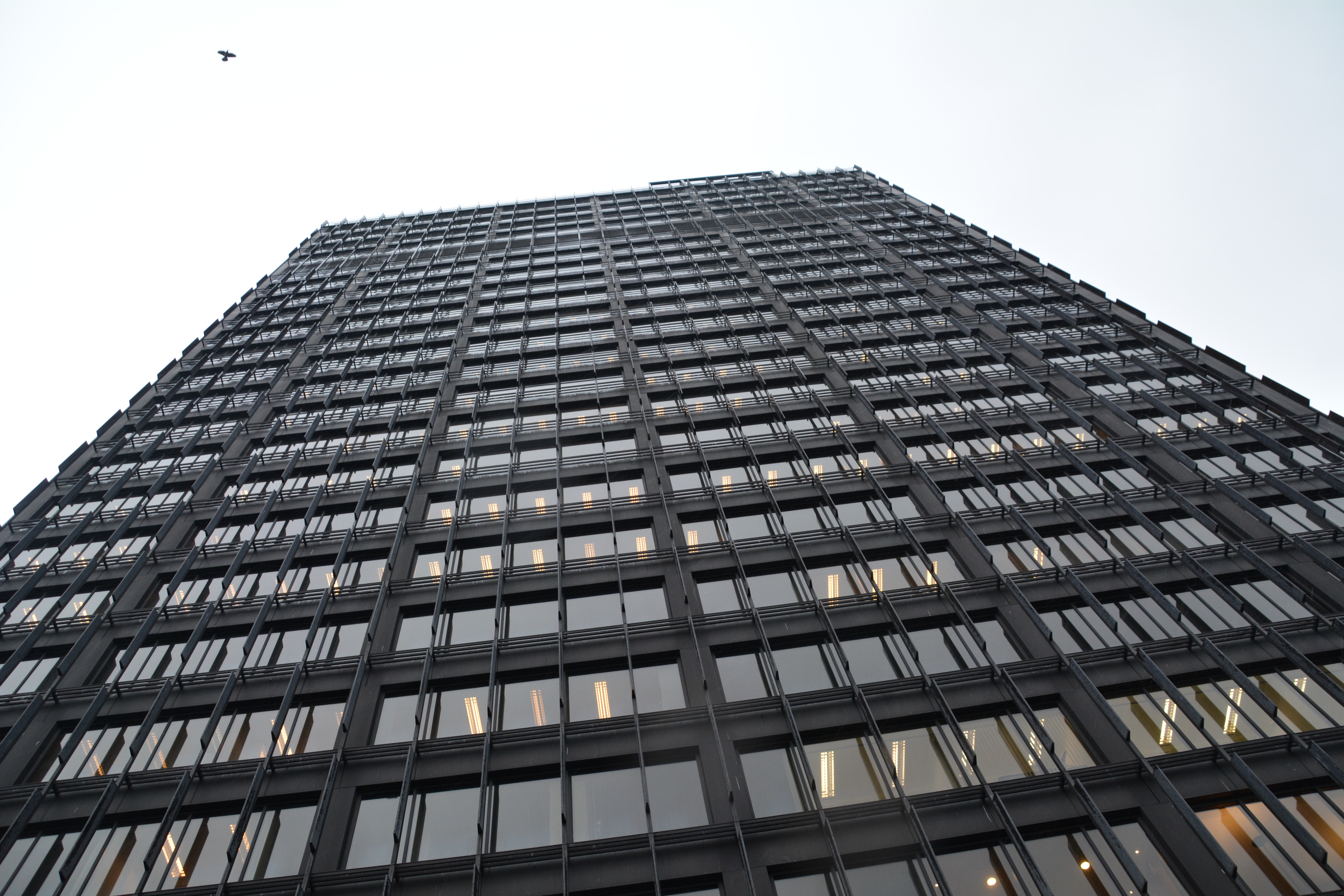 Photo en contre plongée de la Tour ITT